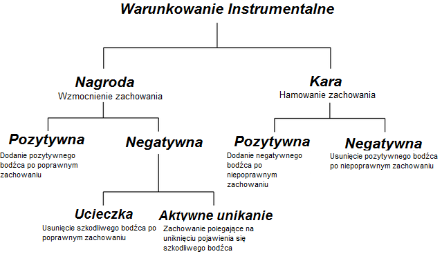 Diagram warunkowania instrumentalnego